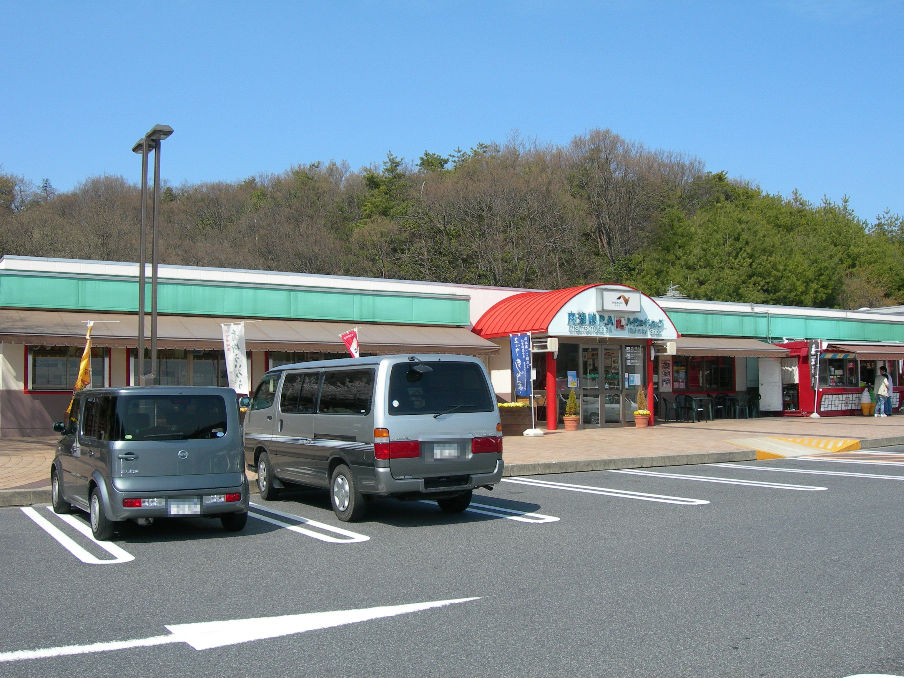 内津峠パーキングエリア 上り線施設